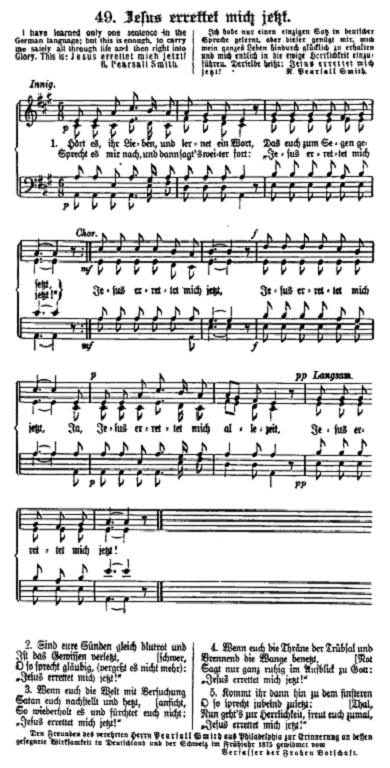 Das Lied ist im Buch "Auf Dein Wort" von Dellsperger Nägeli und Ramser enthalten und ist vom Alter her gemeinfrei. Ernst Gebhard verstarb 1899